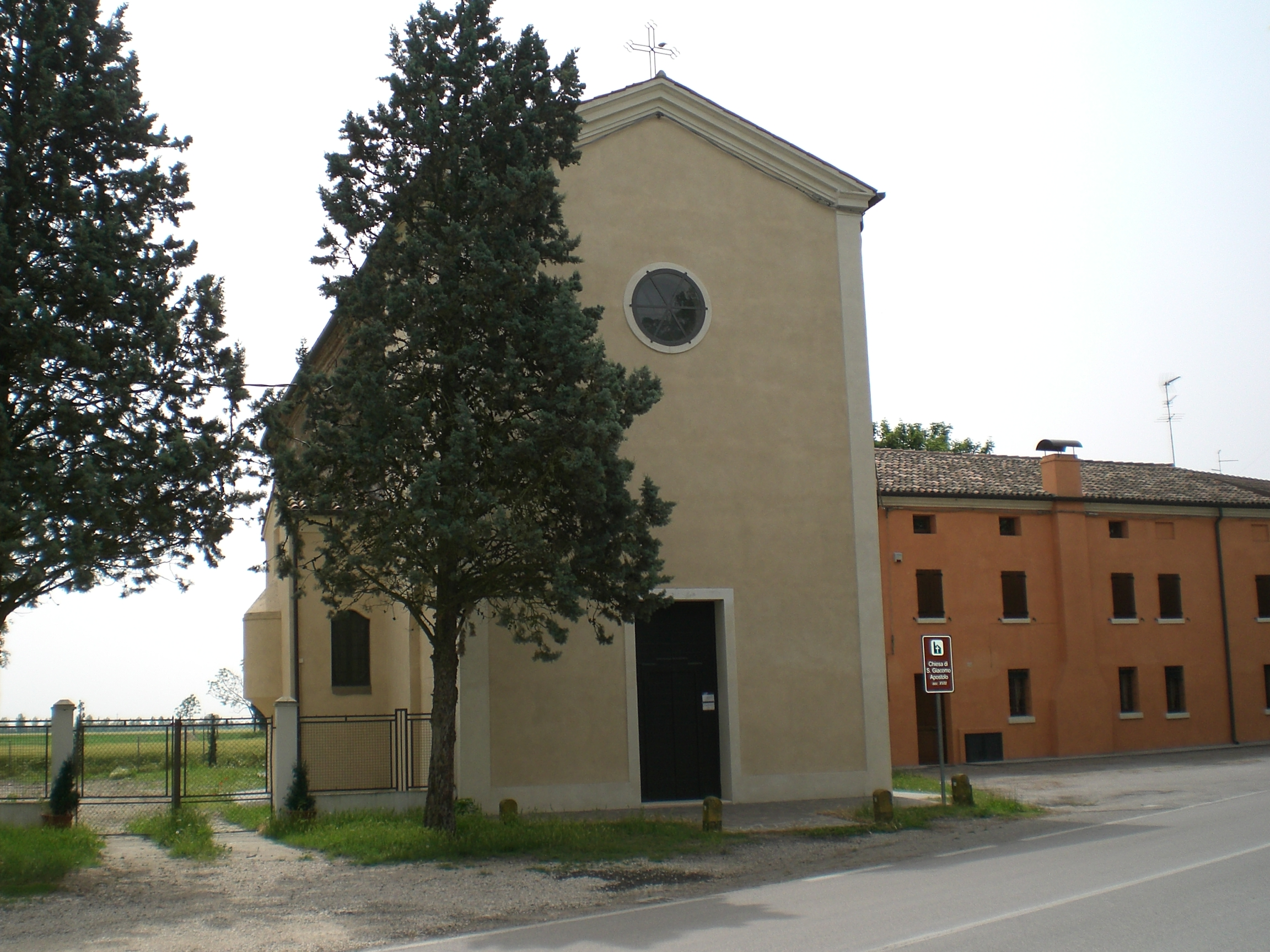 Fossa d'Albero, frazione di Ferrara: la chiesa parrocchiale di San Giacomo Apostolo (XVIII secolo).